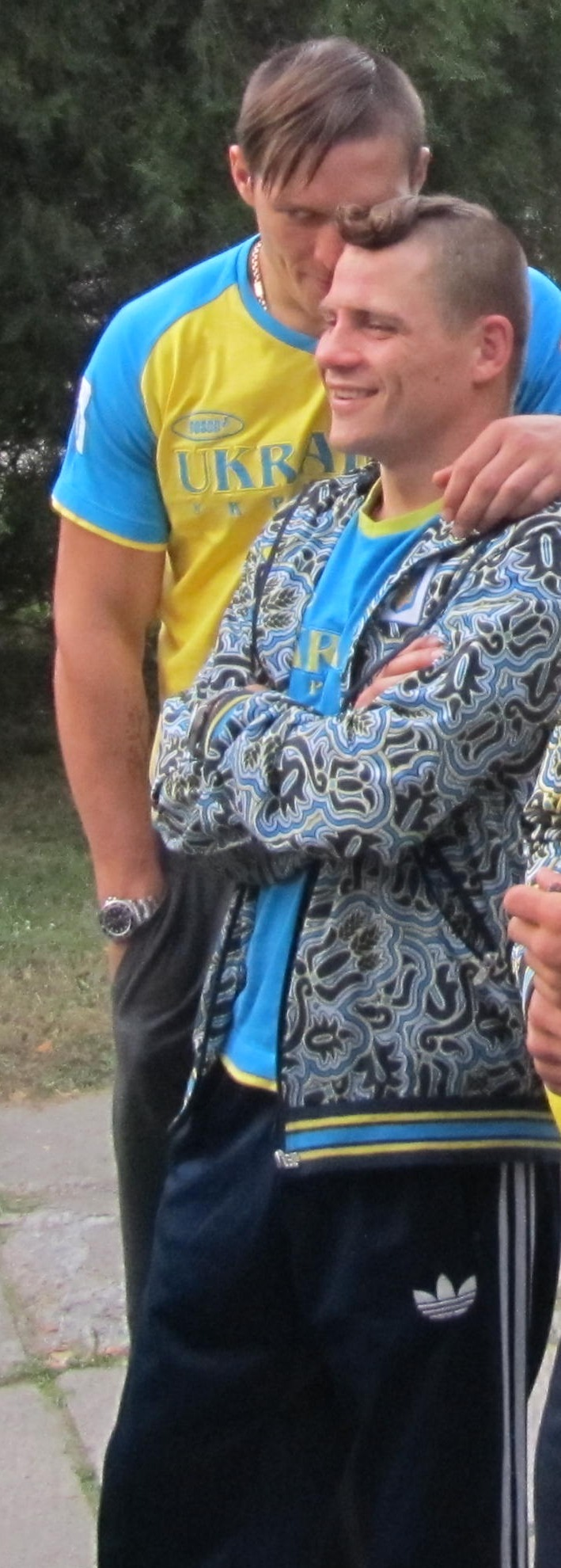 Берінчик та Усик (Кременчук, 4.10.2012)